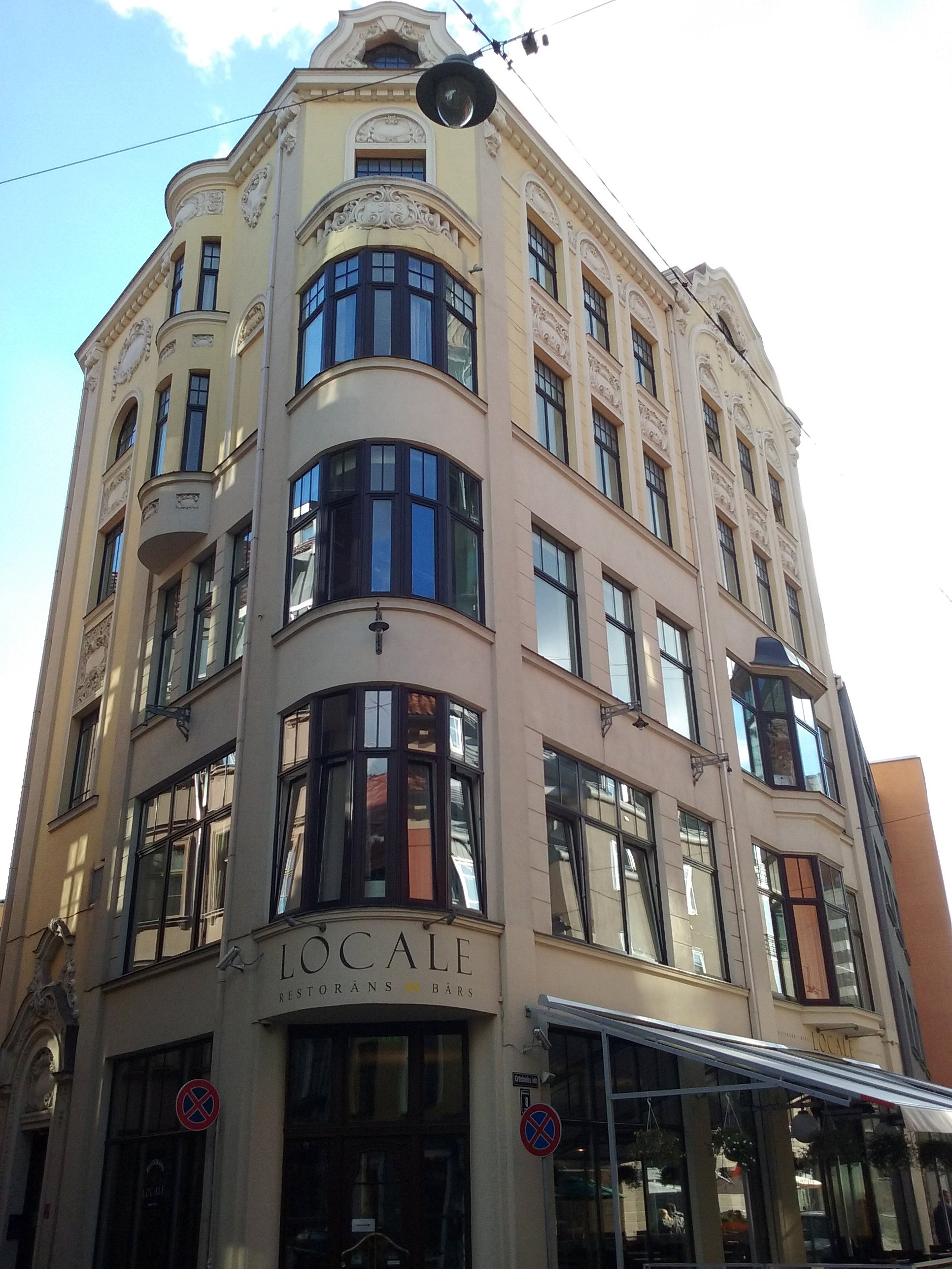 Dzīvojamā ēka, Rīga, Grēcinieku iela 8